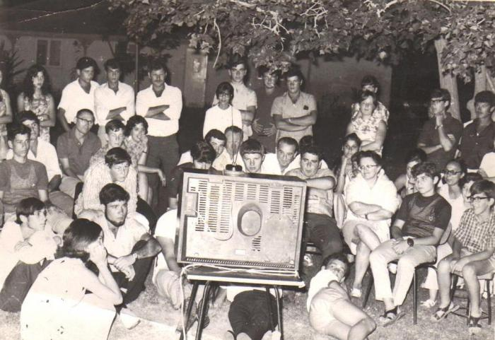 החברים צופים בטלוויזיה הראשונה: בין החבריםף נסיה ויוסף אואון, מתי ברקאי, שרקה ויוסי פרחיה, עמליה גליני,אריה שמואלי. בין הילדים:רני אורון,גד אורון, אריאלה לדז'ינסקי,יוסי רויטמן, יובל סקר,רחלי להב,משה שוורצמן,עופר המר,ארנון כהן, איתמר כהן,עוזי בר-און